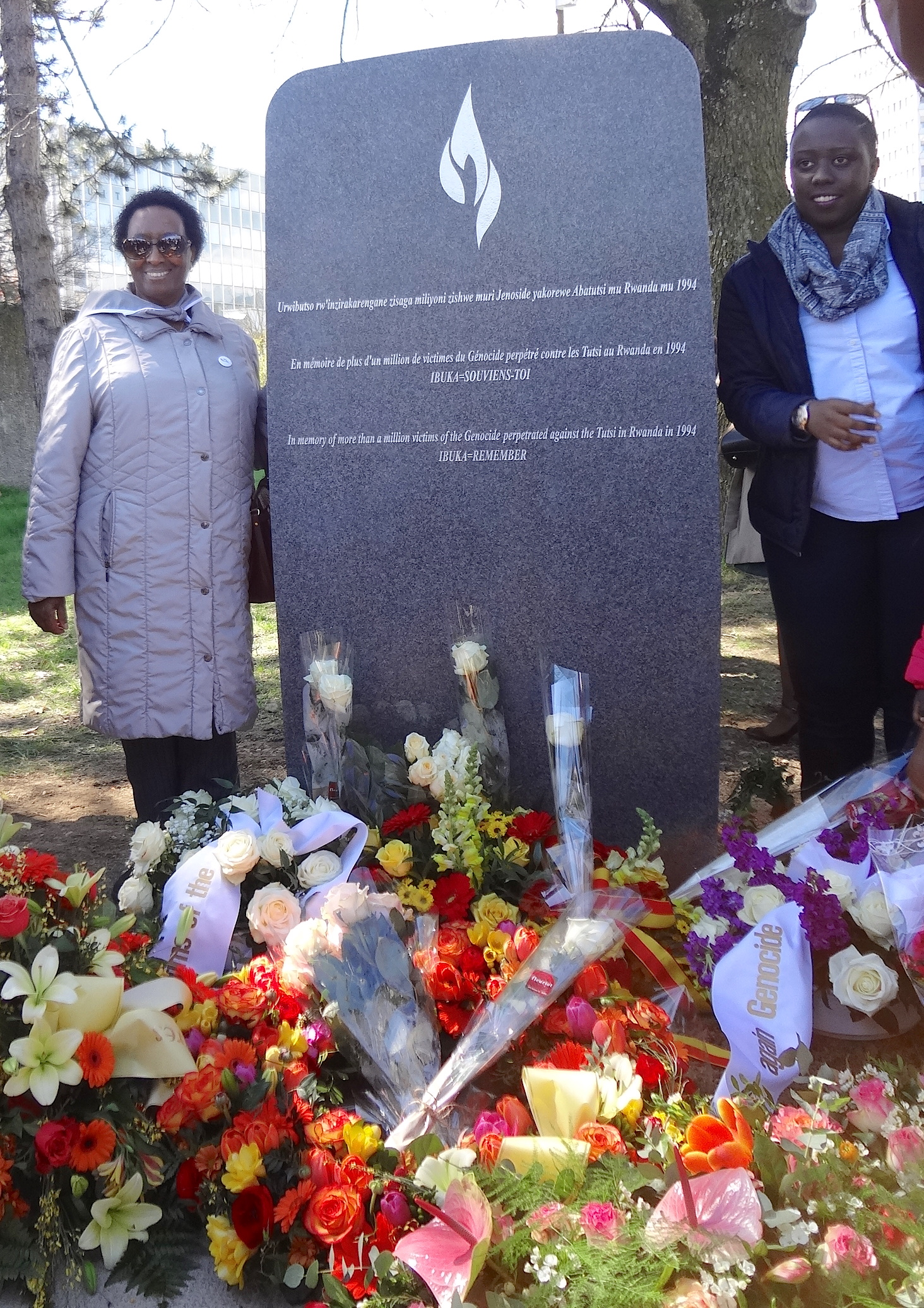 « Dévoilement du mémorial aux victimes du génocide perpétré contre les Tutsi au Rwanda en 1994 », 8 avril 2019 à la place des Nations à Genève. Ont pris la parole : Rémy Pagani (conseiller administratif de la Ville de Genève), Cesar Murangira (président de Ibuka Mémoire et Justice section suisse) et François Xavier Ngarambe (ambassadeur du Rwanda en Suisse).